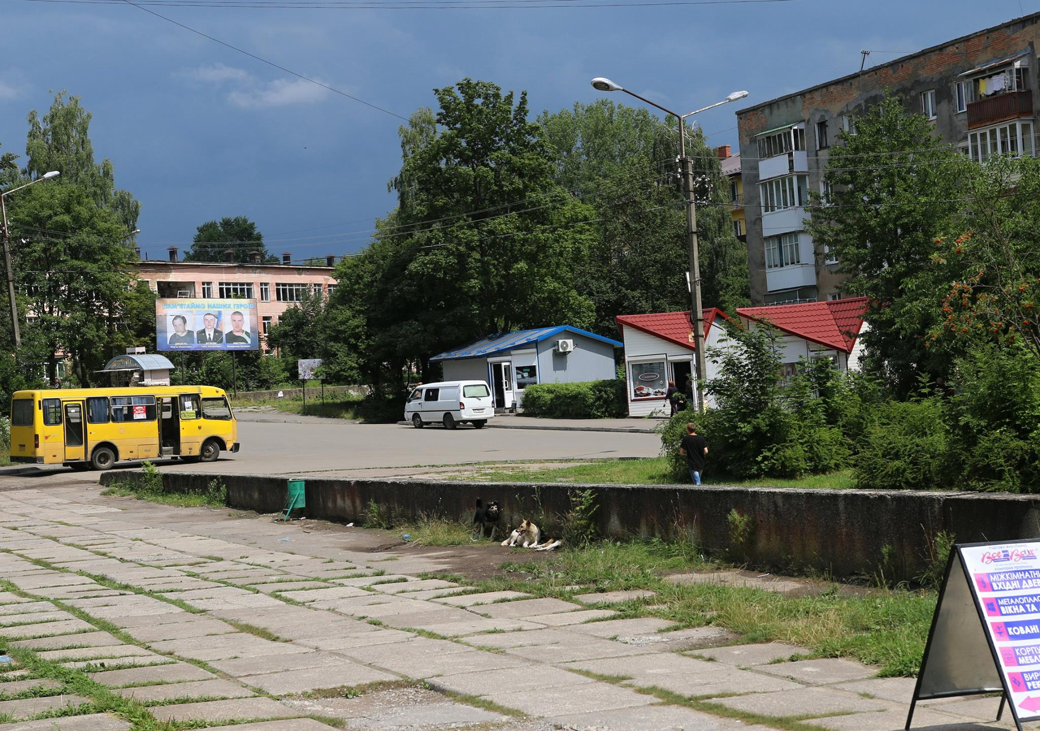 Ulice v ukrajinském Stebnyku